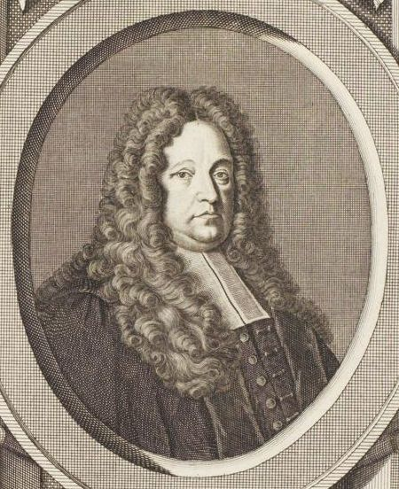 Porträt des Prof. Dr. jur. Georg Radow (1635-1699), Syndicus der Hansestadt Lübeck.